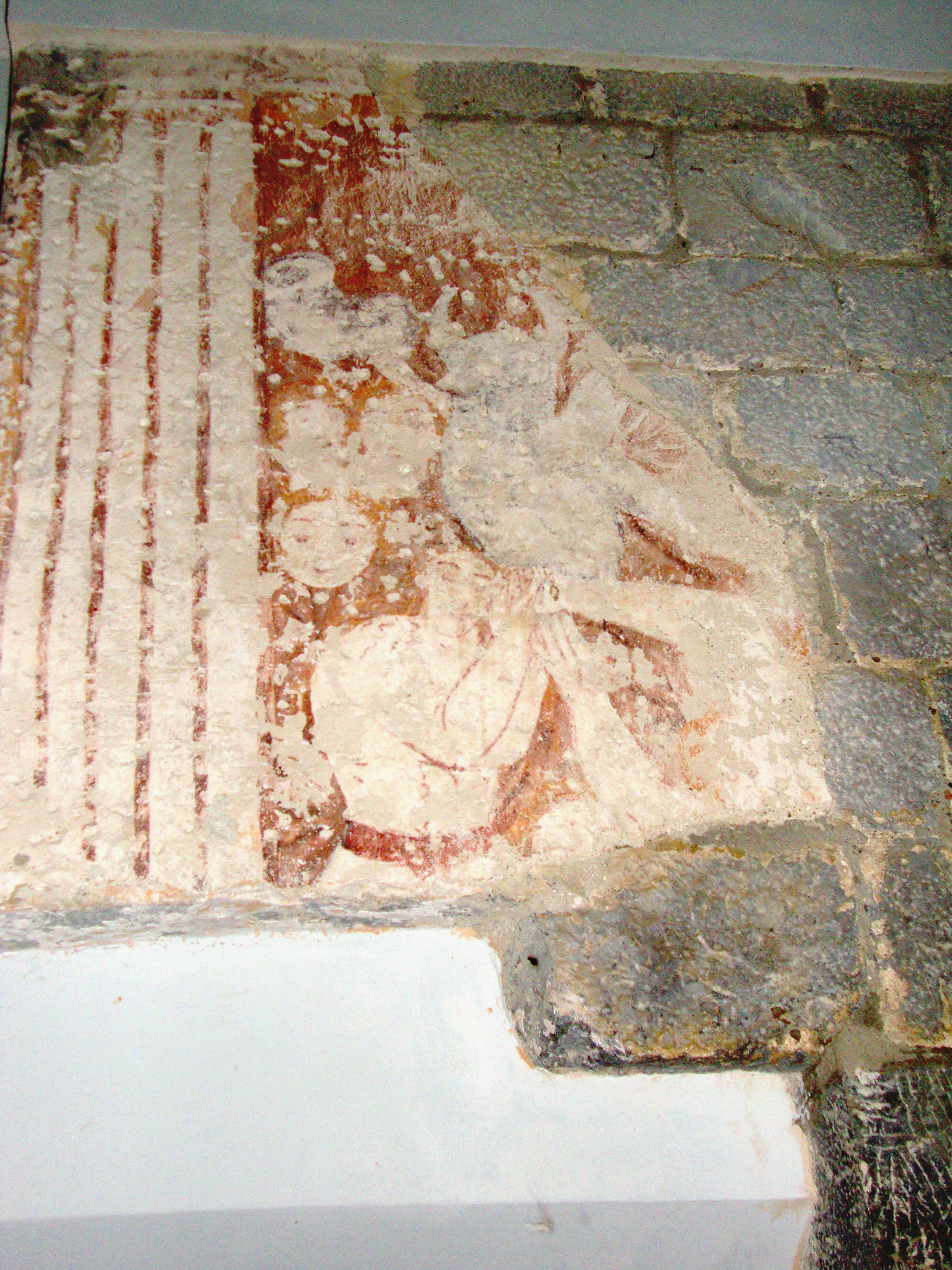 Arhan (Lacarry e.a., Pyr-Atl, Fr) fragment de fresque dans l'église